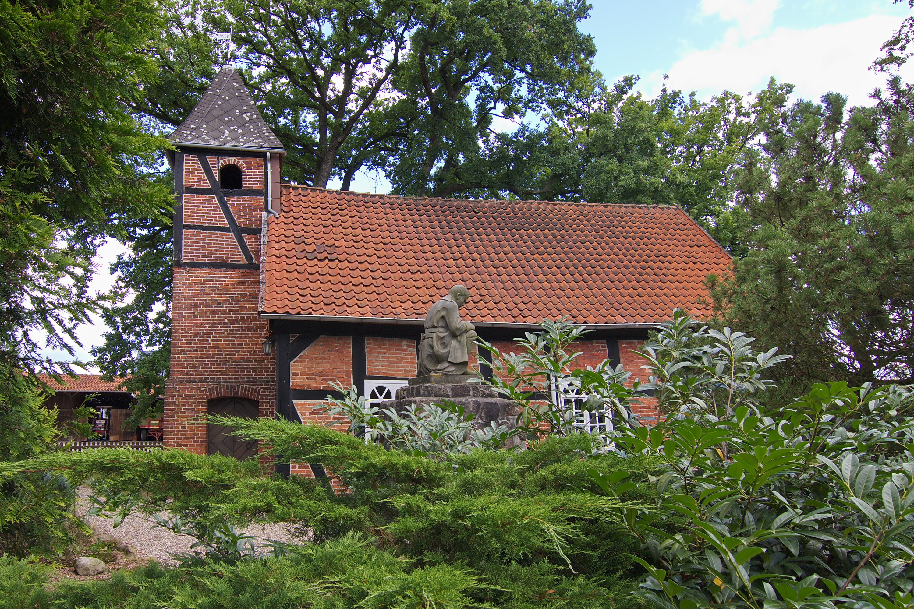 Am 11.12. 1748 wurde die Kapelle in Lutter (Neustadt am Rübenberge) am Standort einer älteren Kapelle eingeweiht.